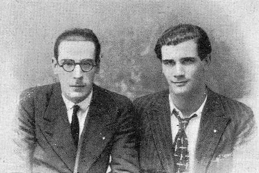 Antonio Goy Díaz e Manuel García Ouro, fotografía en Vida Gallega 1932